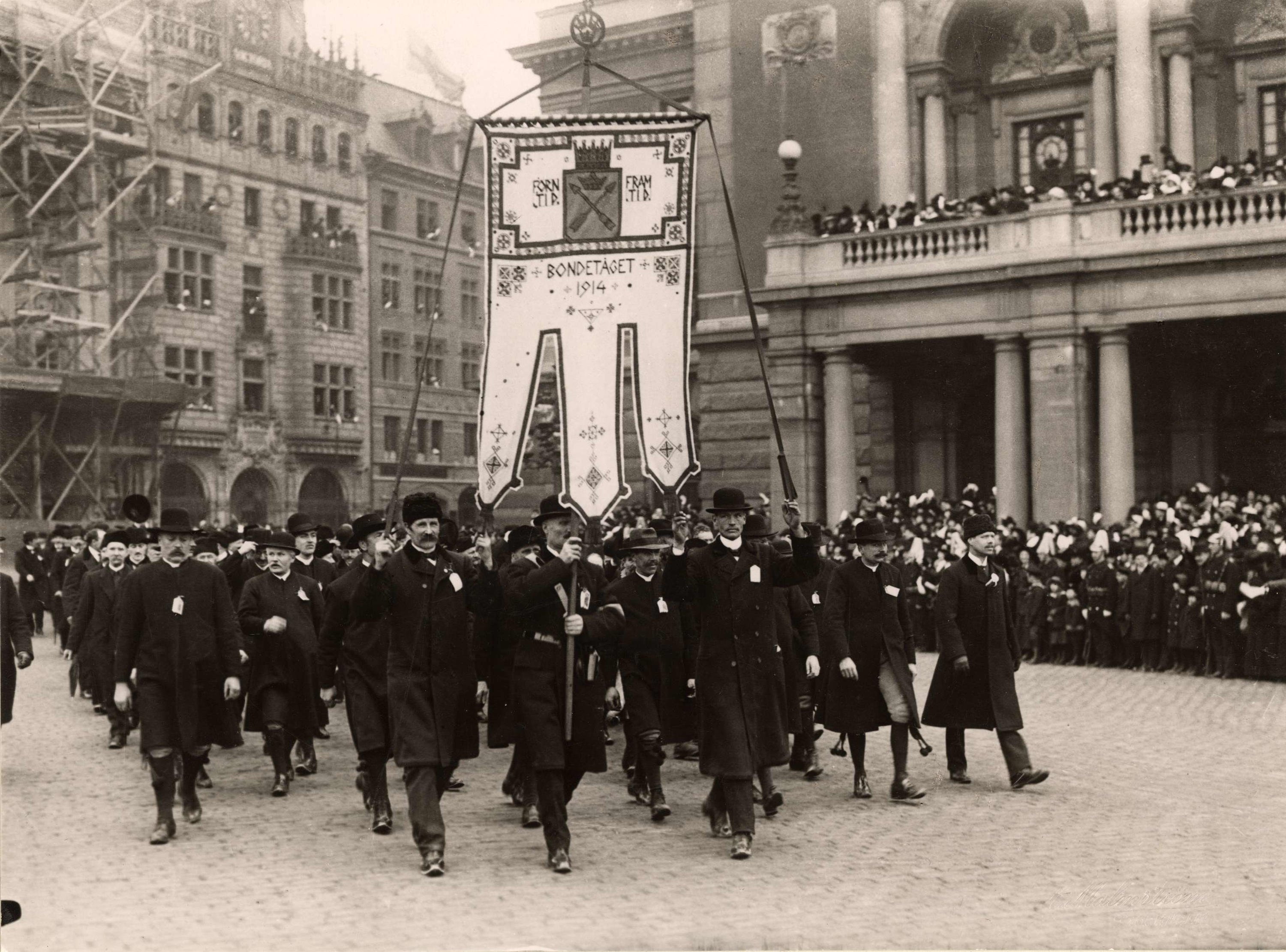 Bondetåget den 6 februari 1914. Foto från Gustav Adolfs torg i Stockholm. Nordiska museet arkiv NMA.0033487